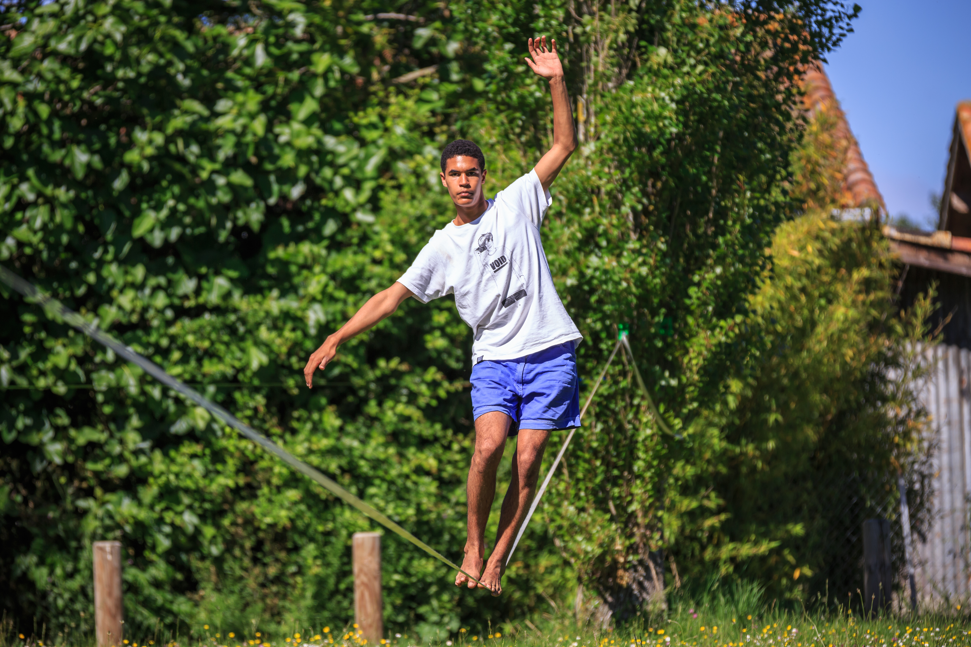 Pratique de la slackline dans un parc à Toulouse en France